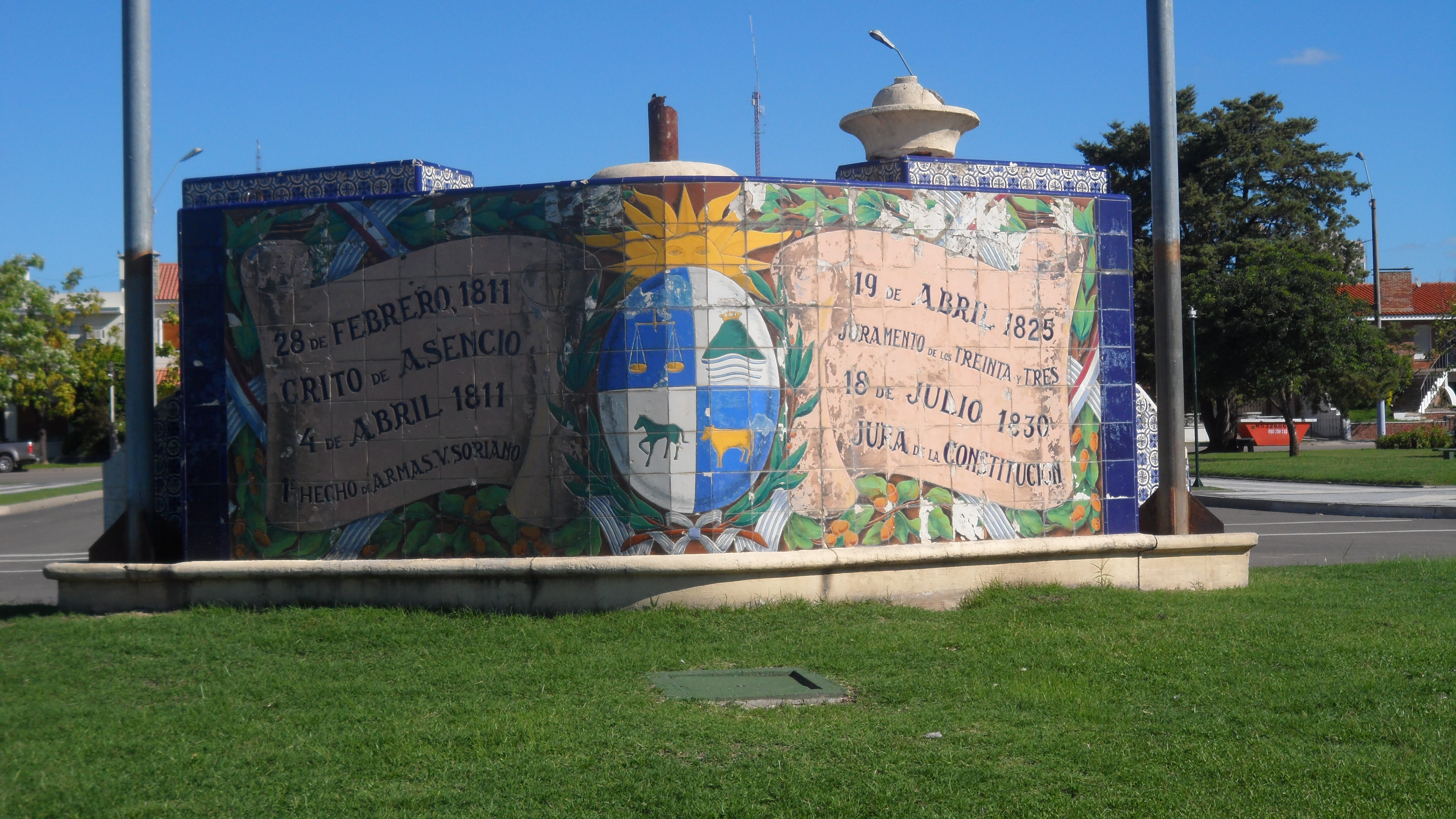 Monumento al Grito de Asencio. Ubicada en el departamento de Soriano